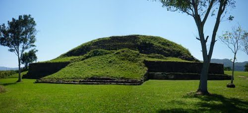 Vista Frontal